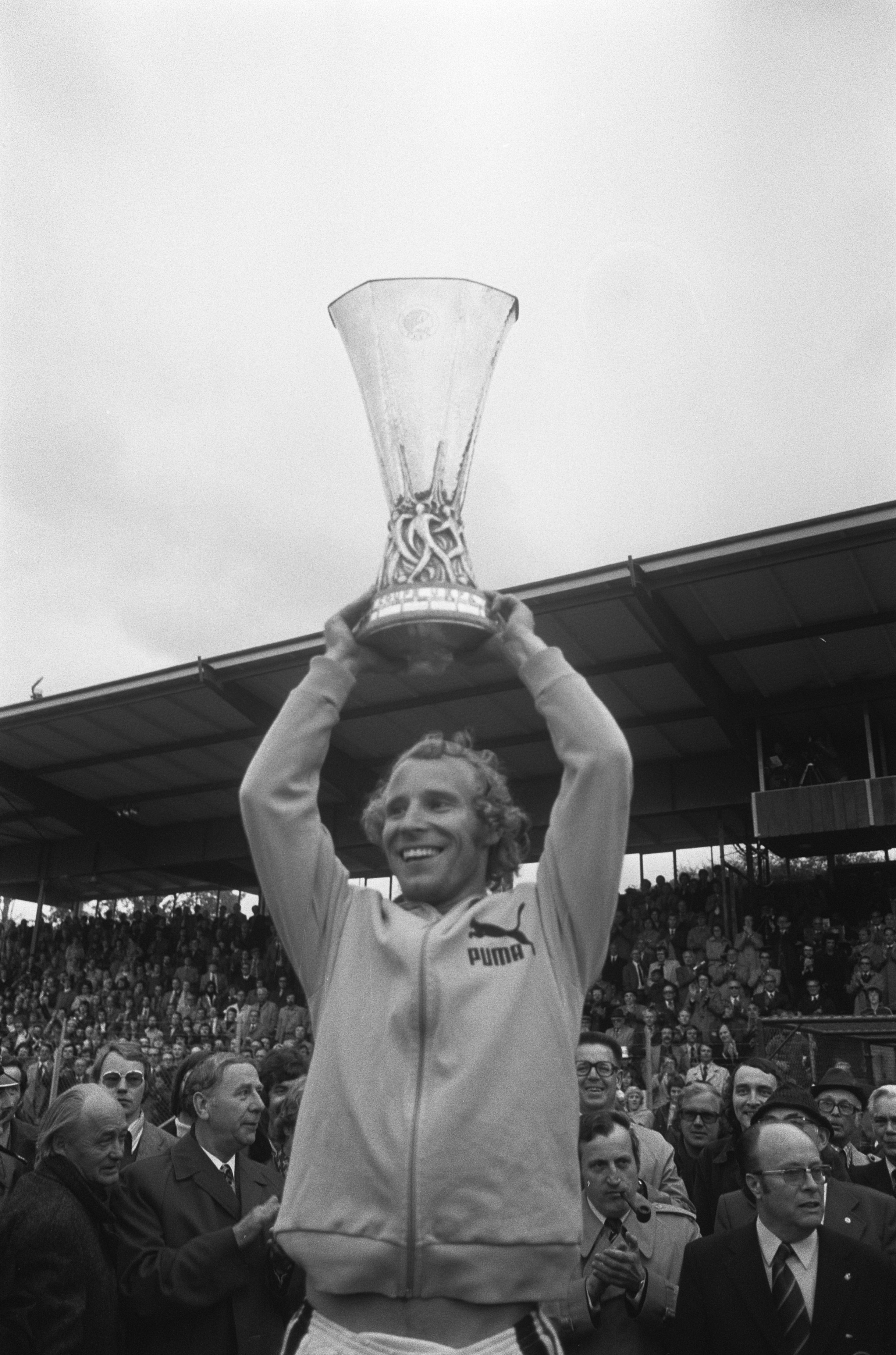 Collectie / Archief : Fotocollectie Anefo Reportage / Serie : FC Twente-Borussia Mönchengladbach 1-5 (returnwedstrijd finale Europa Cup 3) Beschrijving : Aanvoerder Vogts (Borussia MG) met de UEFA-cup Datum : 21 mei 1975 Locatie : Enschede, Overijssel Trefwoorden : aanvoerders, bekers, spelers, sport, voetbal Persoonsnaam : Vogts, Berti Fotograaf : Fotograaf Onbekend / Anefo Auteursrechthebbende : Nationaal Archief Materiaalsoort : Negatief (zwart/wit) Nummer archiefinventaris : bekijk toegang 2.24.01.05 Bestanddeelnummer : 927-9405